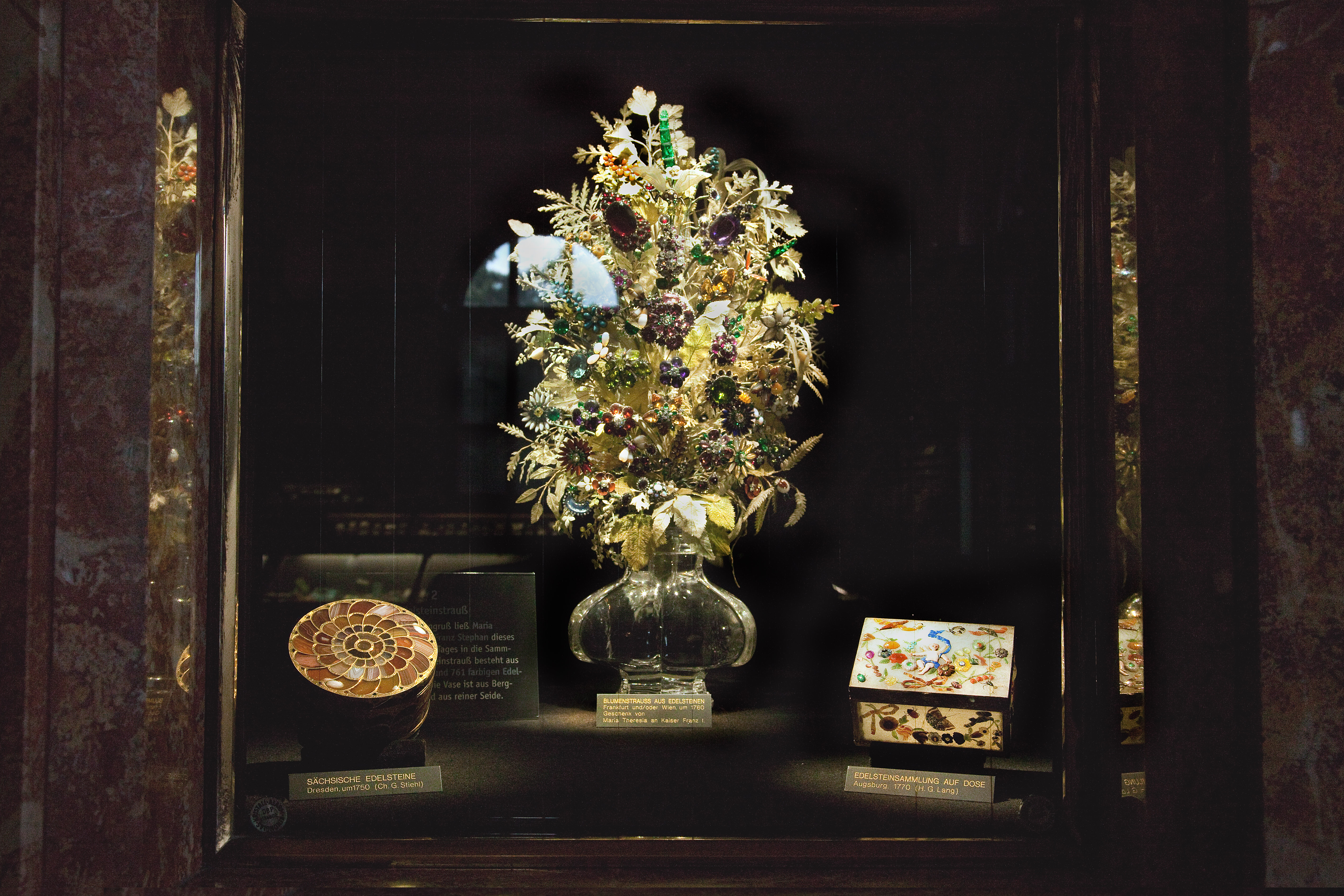 Der Strauß ist eine barocke Miniatur-Edelsteinsammlung von 2863 Edel- und Schmucksteinen und zählt zu den historisch bedeutendsten Objekten des Naturhistorischen Museums in Wien.